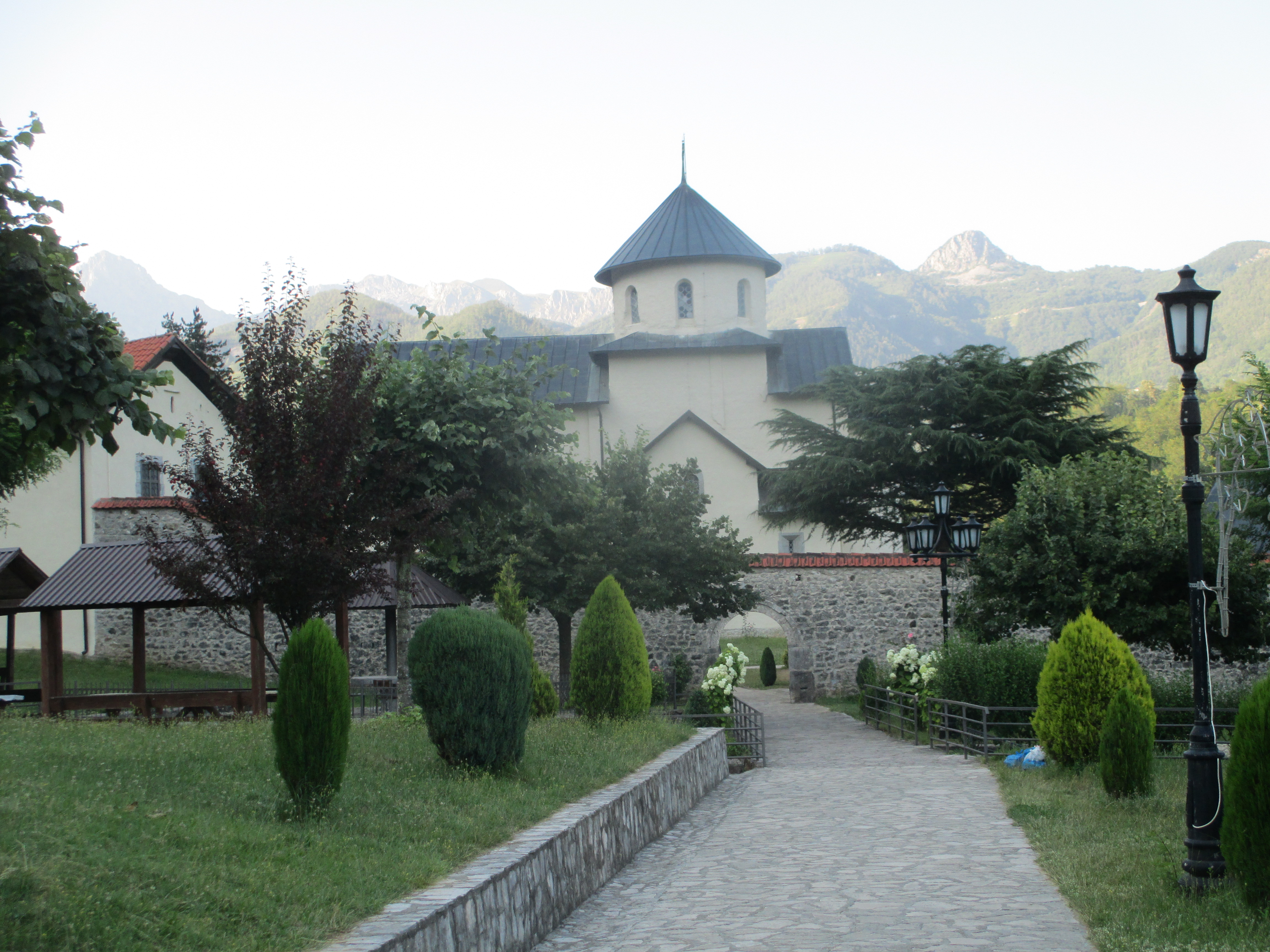 מנזר מוראצ'ה במונטנגרו